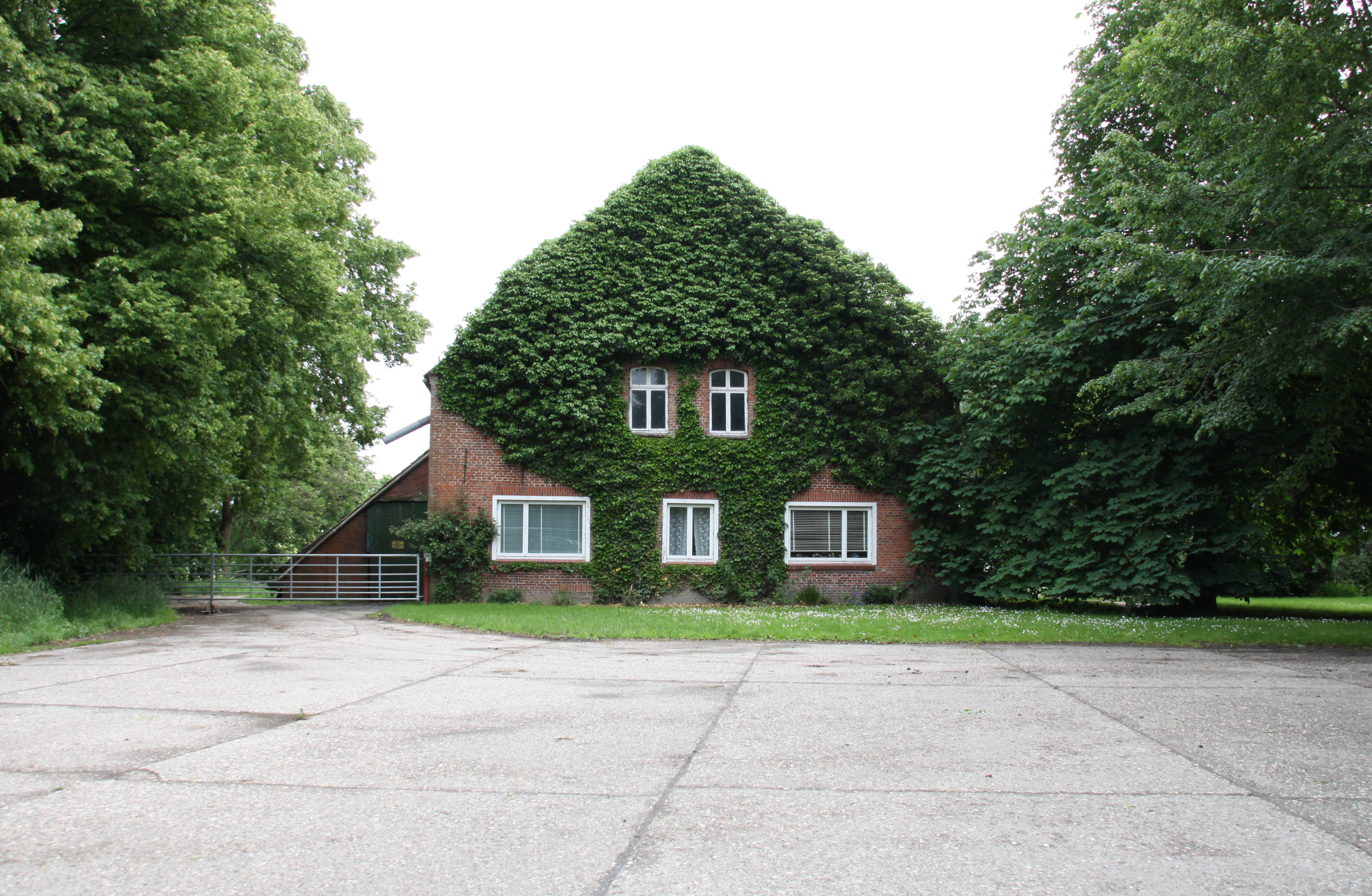 Kloster Sielmönken - heute ein landwirtschaftlicher Betrieb